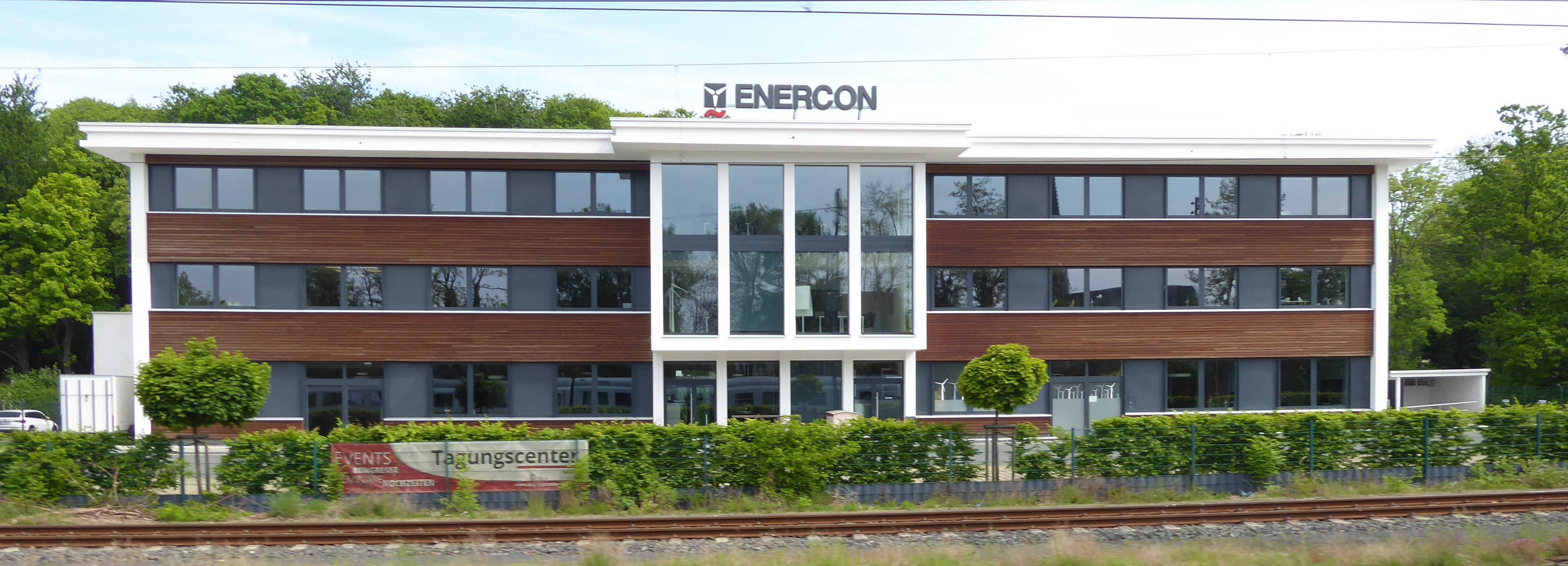 Enercon Niederlassung in Soest, Werkstraße 6